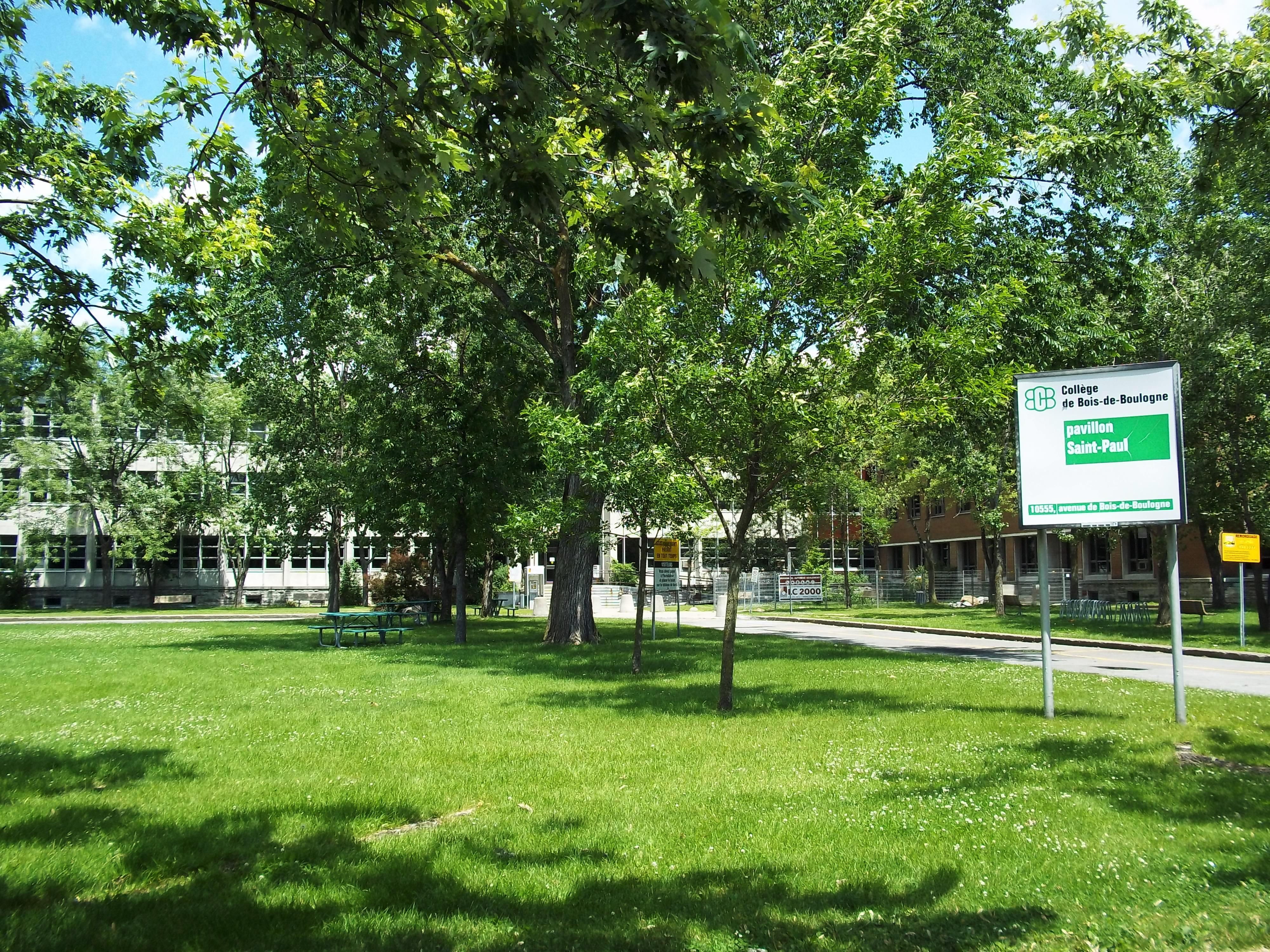 Collège de Bois-de-Boulogne